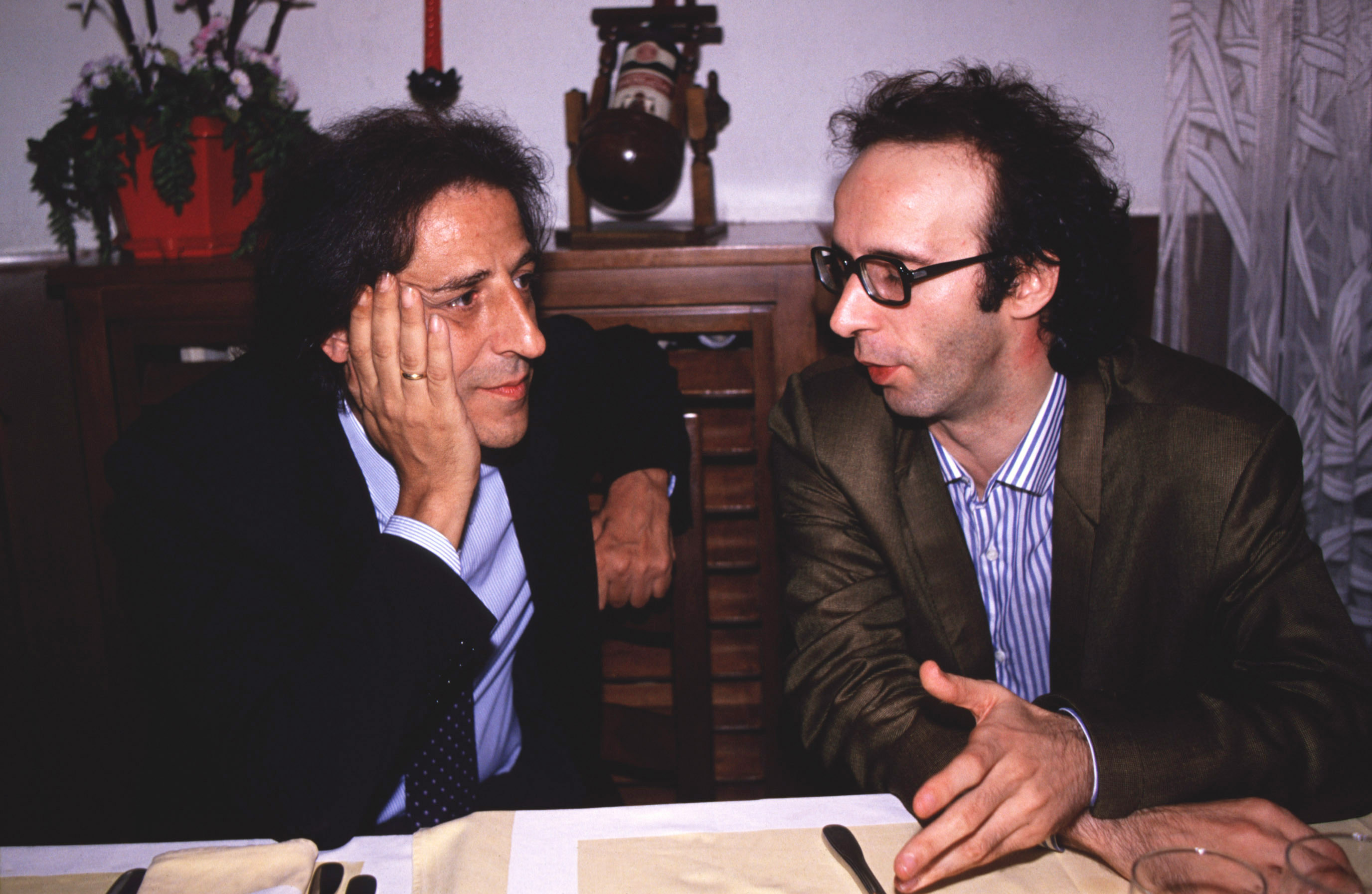 con Giorgio Gaber nel 1990